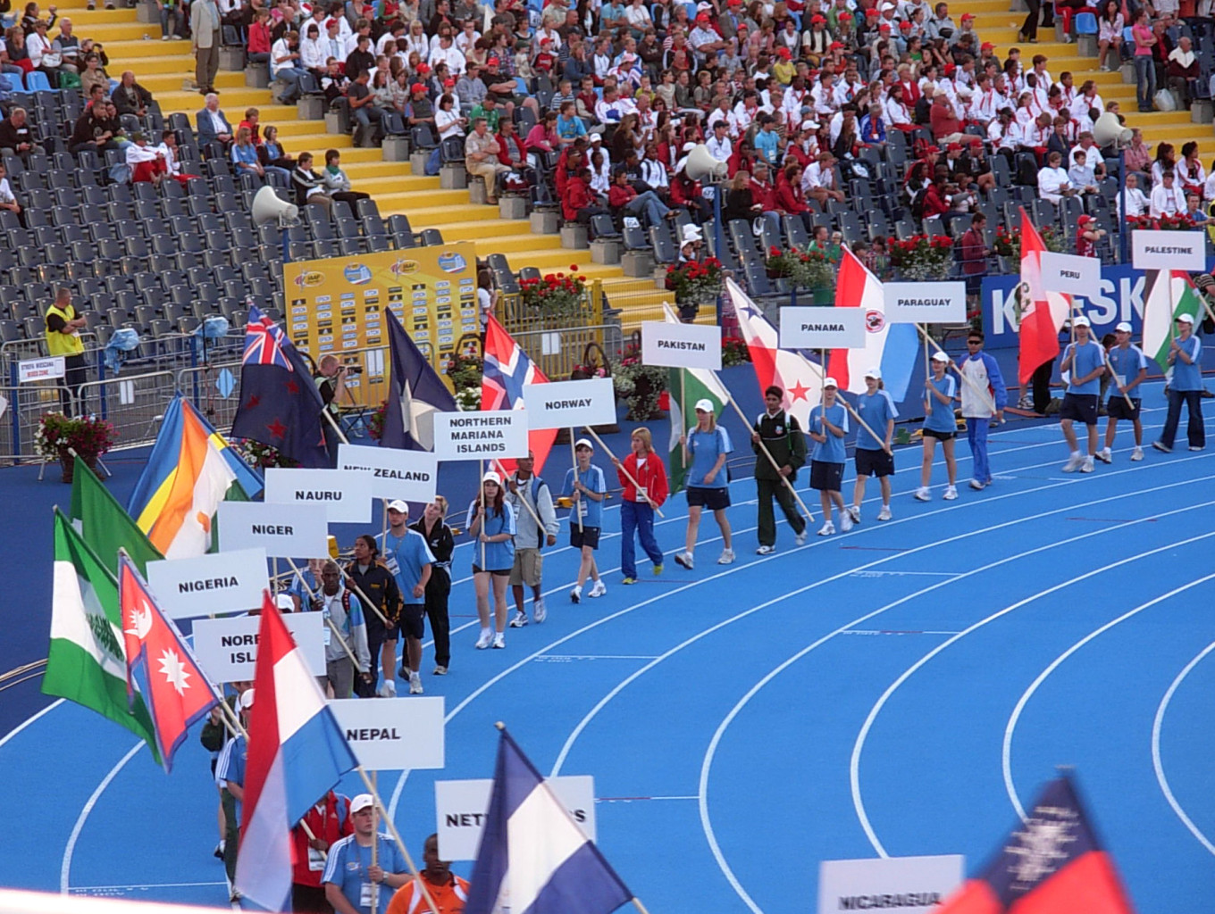 Mistrzostwa Świata Juniorów w Lekkiej Atletyce Bydgoszcz 2008 - ceremonia otwarcia